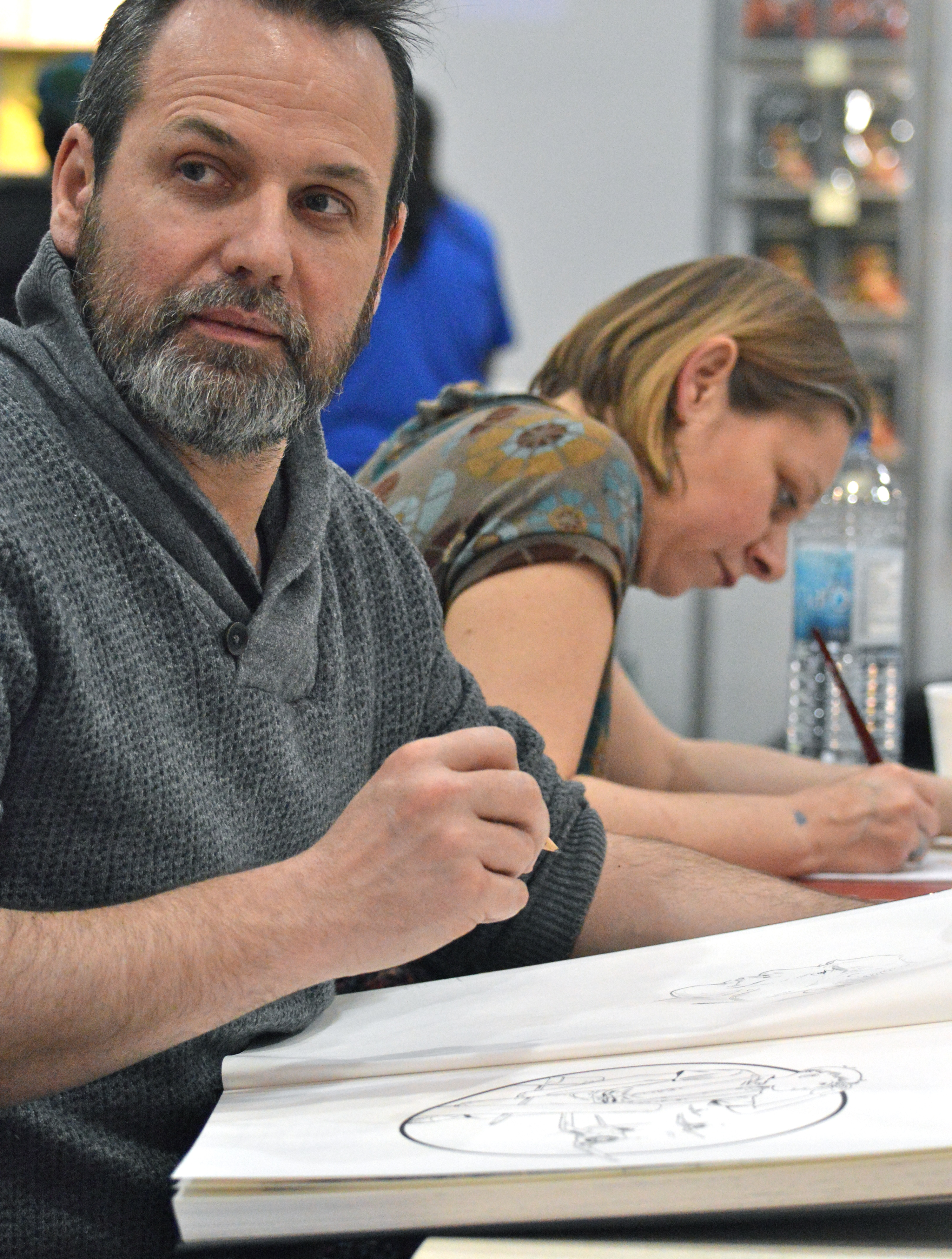 Alain Henriet et Usagi (Patricia Tilkin) au Salon international du livre de Québec 2017